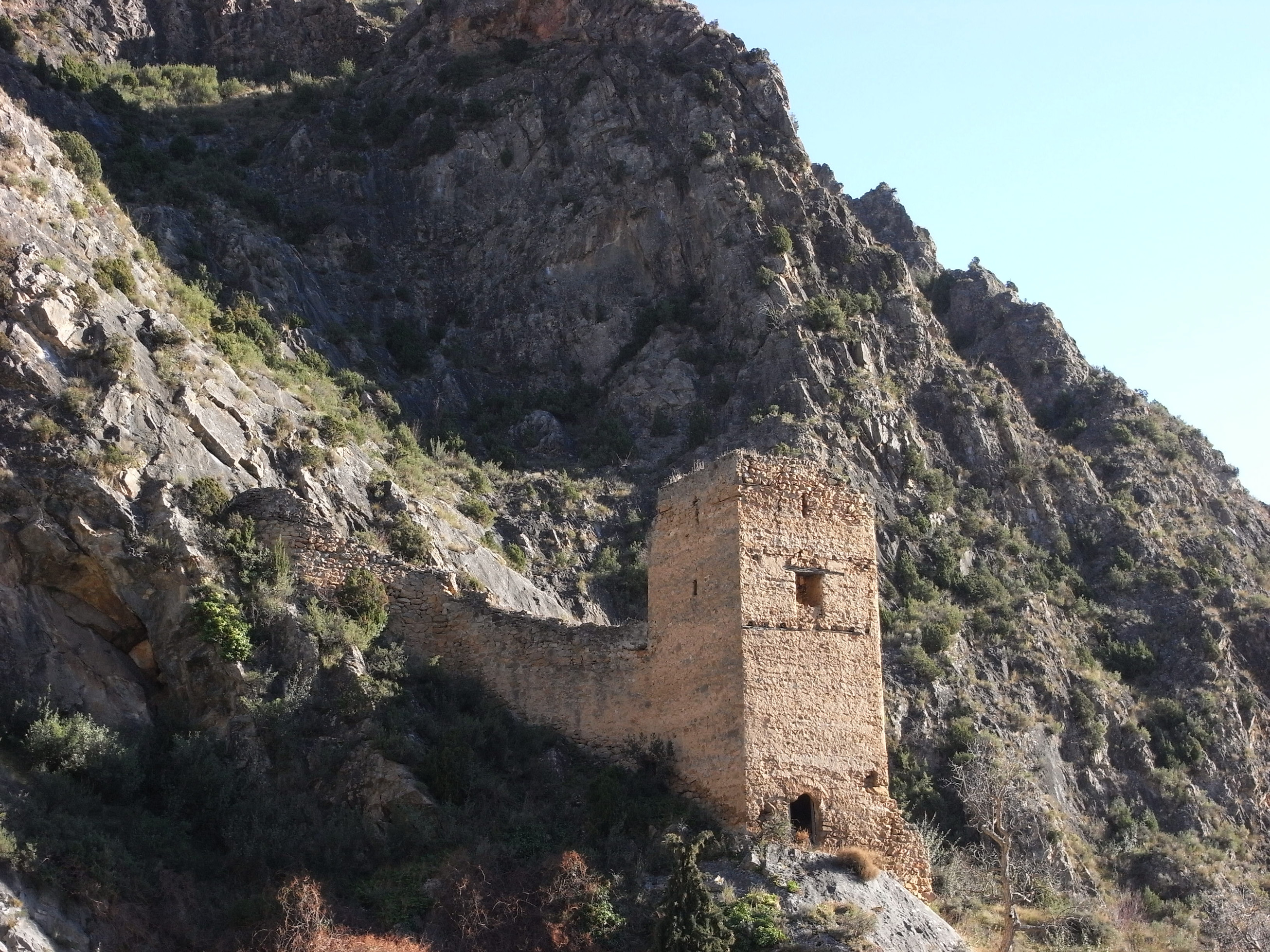 Ruinas del Castillo de Arnedillo en La Rioja, España